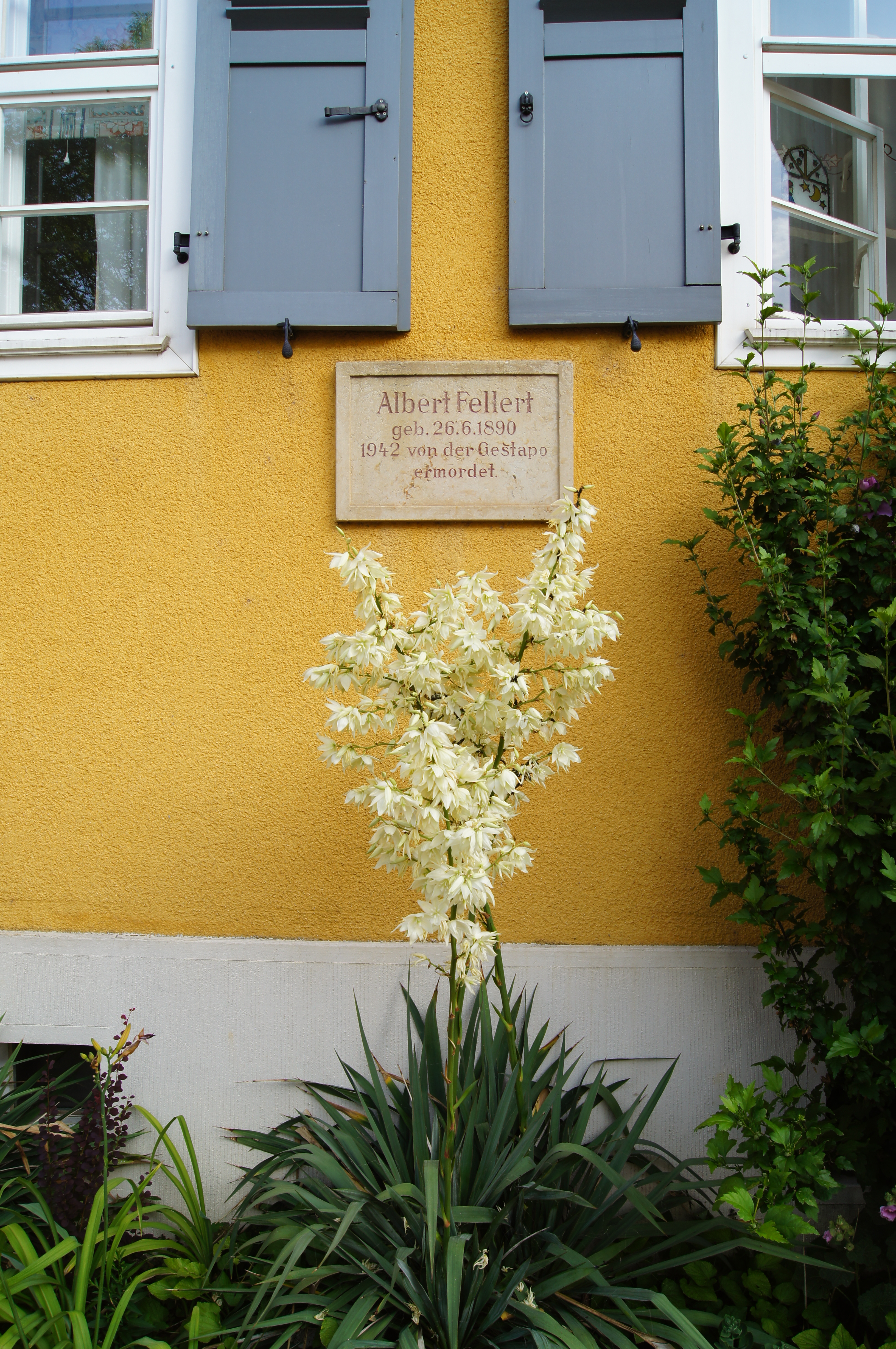 Wohnsiedlung Paulinenhof, Frankfurt (Oder). Gedenktafel für Albert Fellert am Haus Albert-Fellert-Straße 1